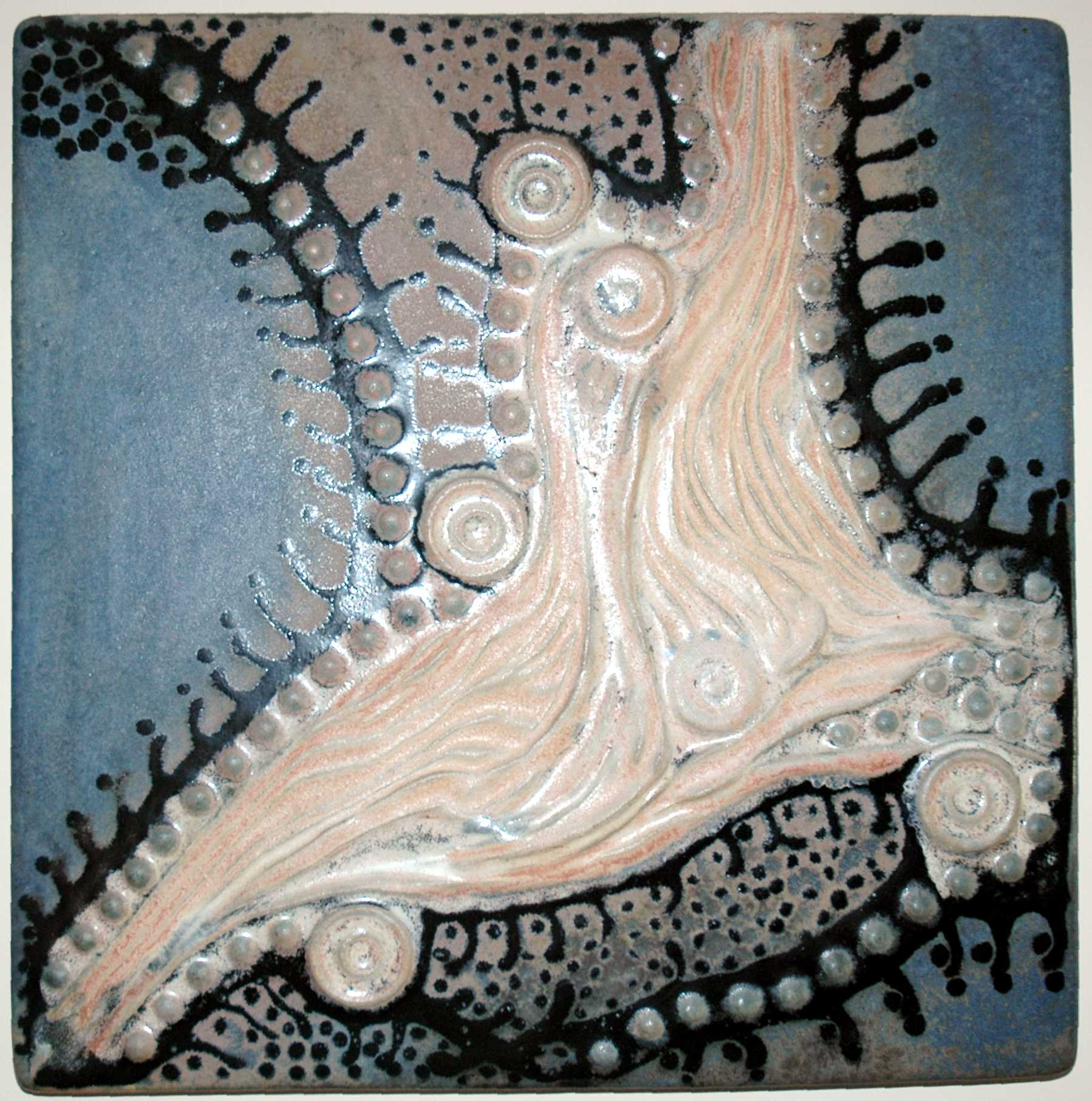 Placa en Grés - 60 x 60 cm